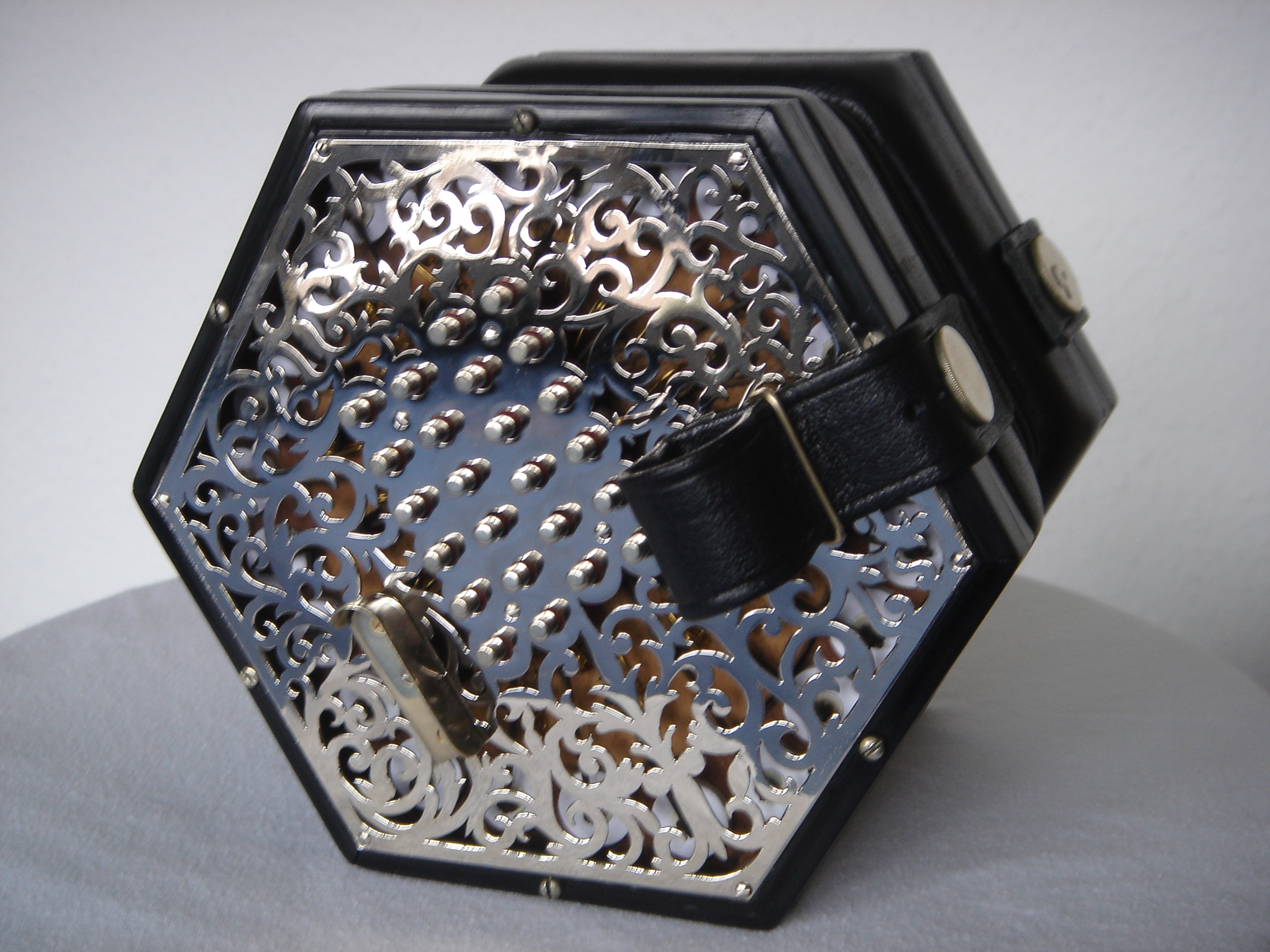 Lachenal English concertina, ca. 1895